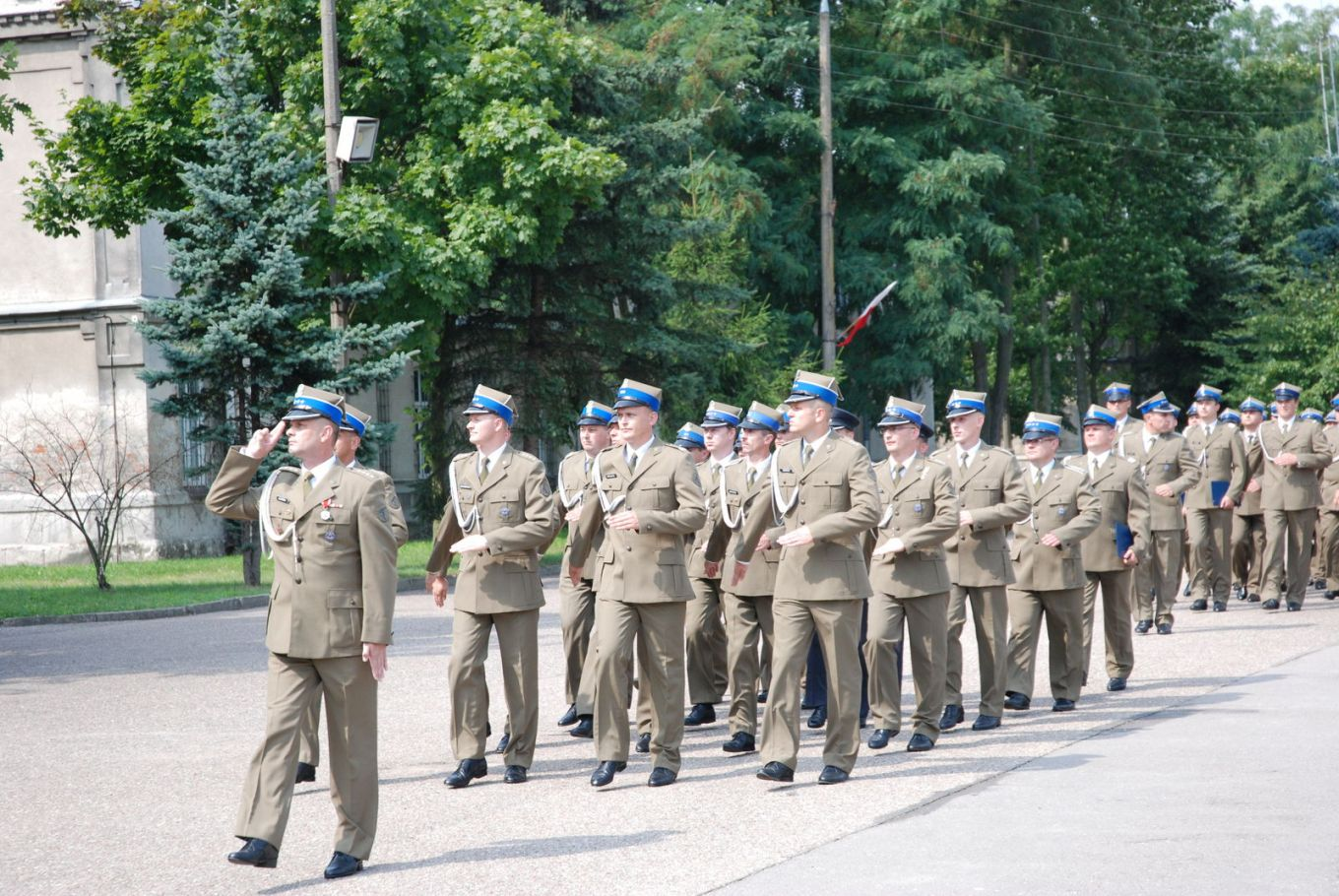 Przasnysz 2010, kadra 2 ORel podczas defilady z okazji święta WP